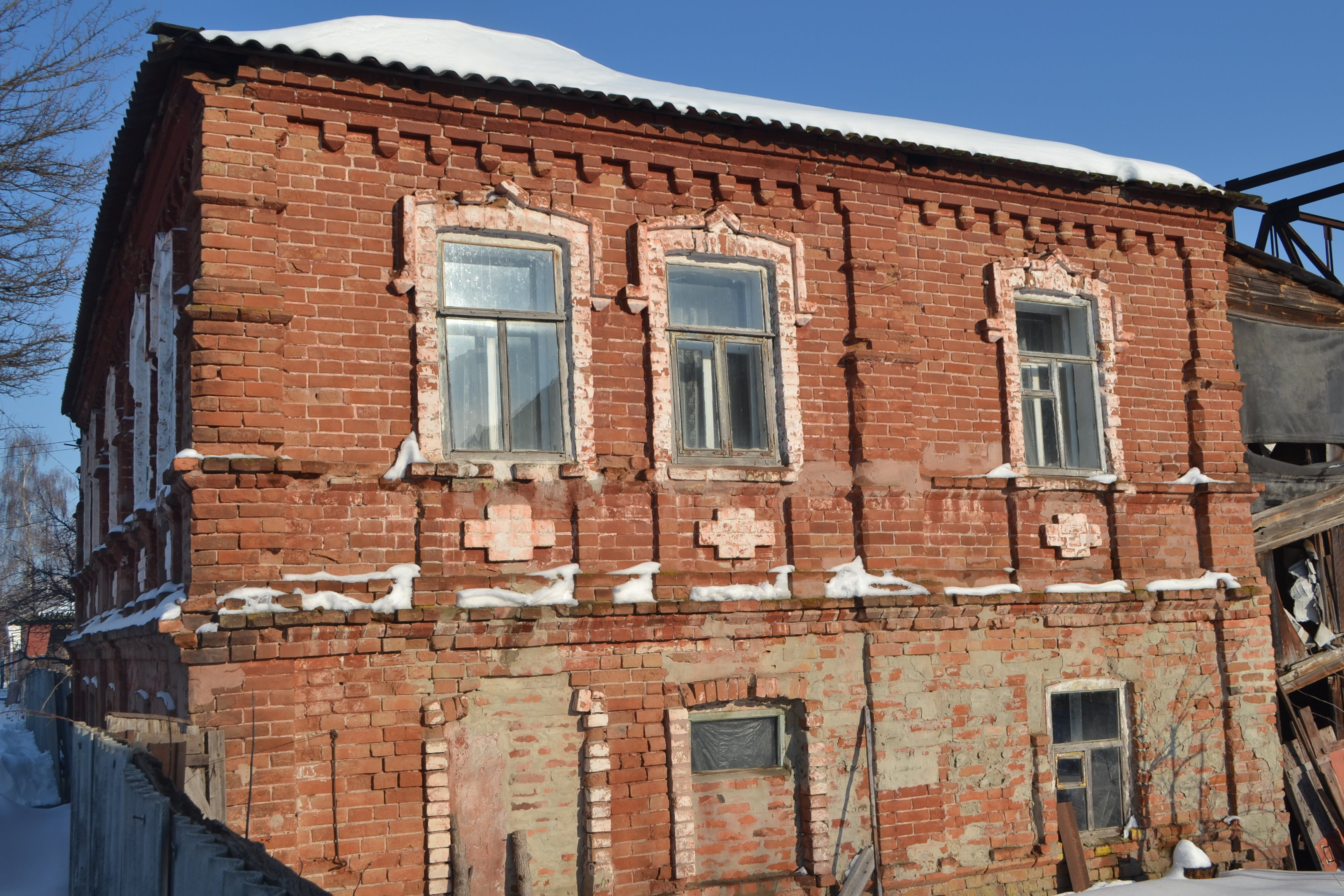 вул. Садова-66. Сватове, Луганська область